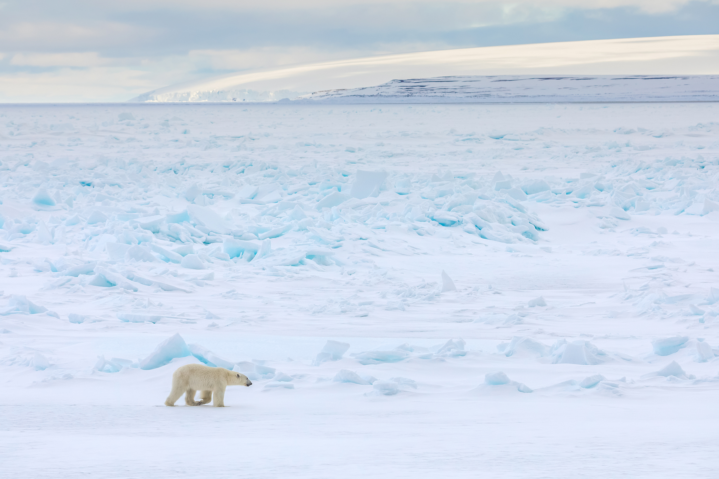 Белый медведь, Комплексный заказник Земля Франца-Иосифа: Архангельск, Приморский район, Архангельская область This image is related to the protected area of Russia number 2930163